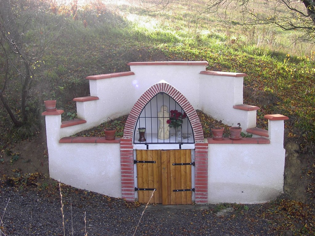 Bax (Haute-Garonne, France) - Fontaine Saint Ferréol, rénovée en 2006